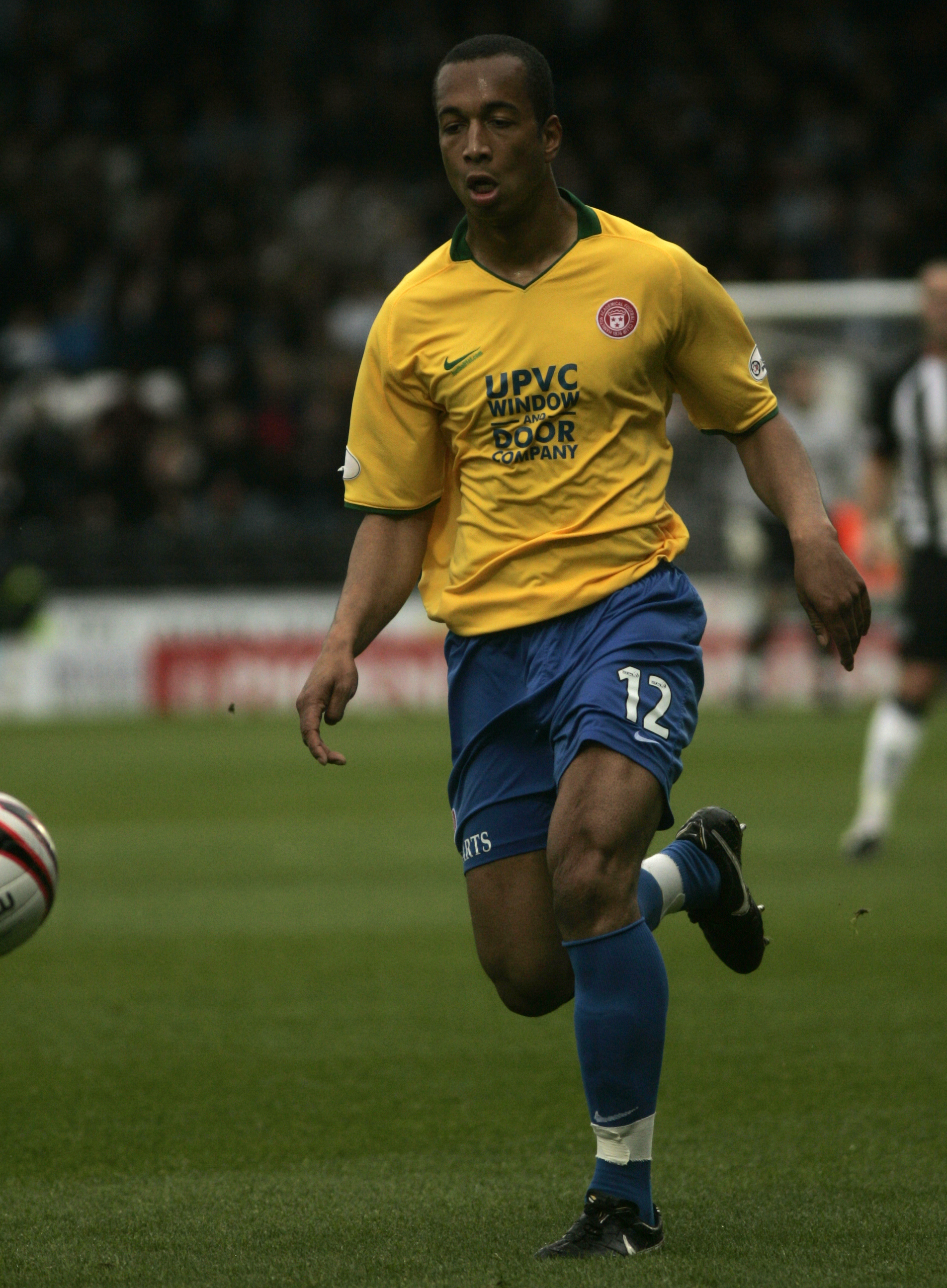 _I7Y7490